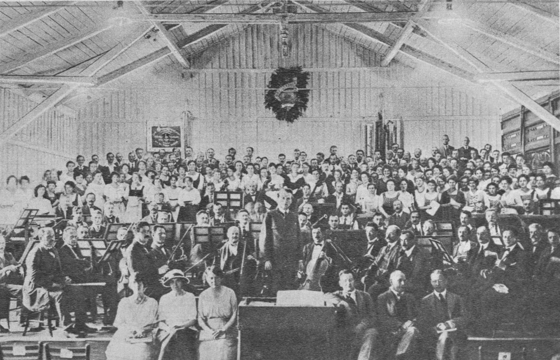 Hermann Schmeidel (1894–1953) dirigiert die Wiener Philharmoniker und den Leobener Chor.Die Beschreibung zum Foto: Obersteierische Musikwoche in Leoben: Generalprobe des Leobener Chorsund der Wiener Philharmoniker unter Leitung des Direktors Hermann Schmeidel.Der aus den Gesangvereinen der Stadt und der Umgebung zusammengestellte gemischte LeobenerChor hat durch seine hervorragenden Leistungen die Anerkennung der besten Musikerunseres Landes gefunden und die Stadt zu einem Mittelpunkte regenmusikalischen Lebens gemacht.Nach einer photographischen Aufnahme.